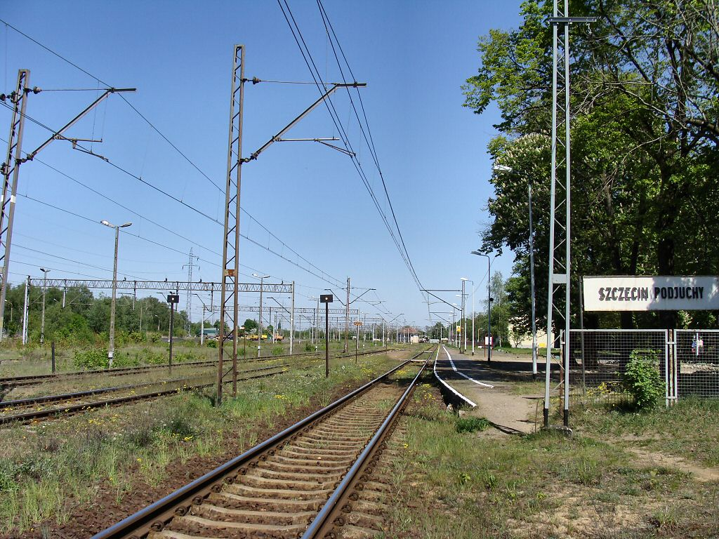 Stacja kolejowa w Szczecinie Podjuchach